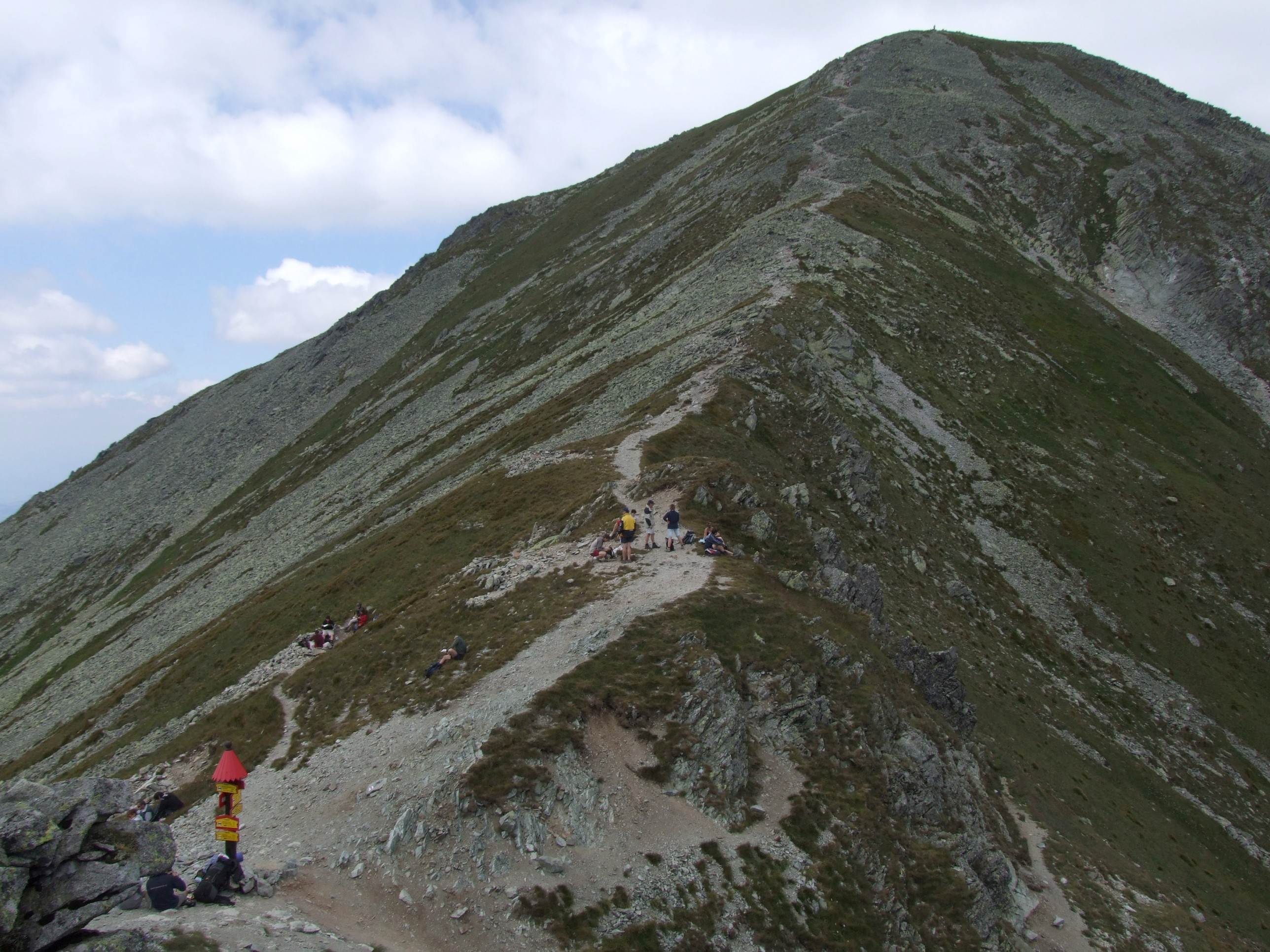 Pachola, Banikowska Przełęcz - West Tatra Mountains